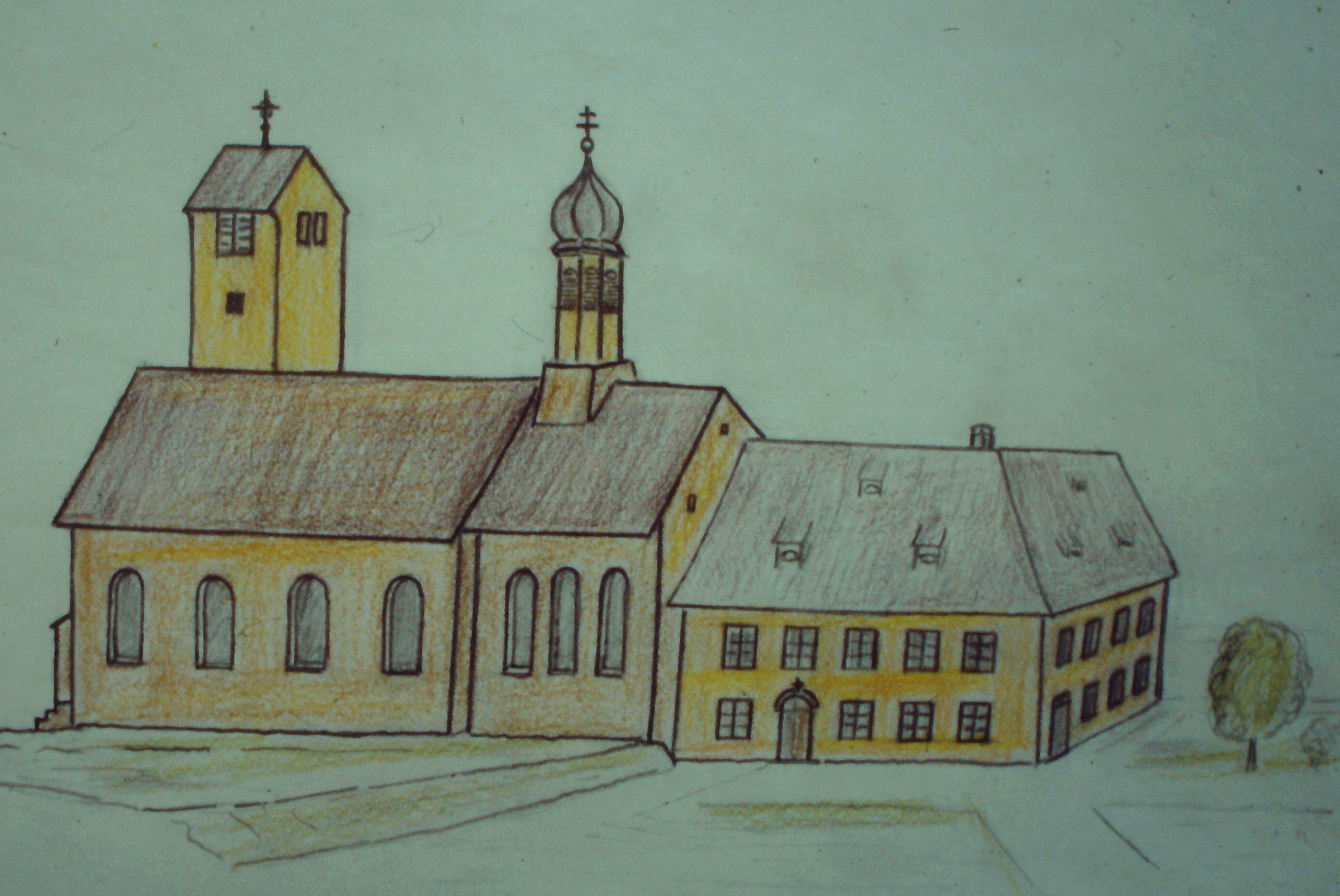 Paulinerkloster Bonndorf um 1815. Extrahiert und nach eigener Vorstellung vervollständigt aus der nachgezeichnet und kolorierten Version einer Zeichnung (?) des Ortes von von Josef Köpfer